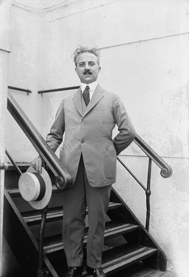 Fortune Gallo (1878 – 1970), opera impresario